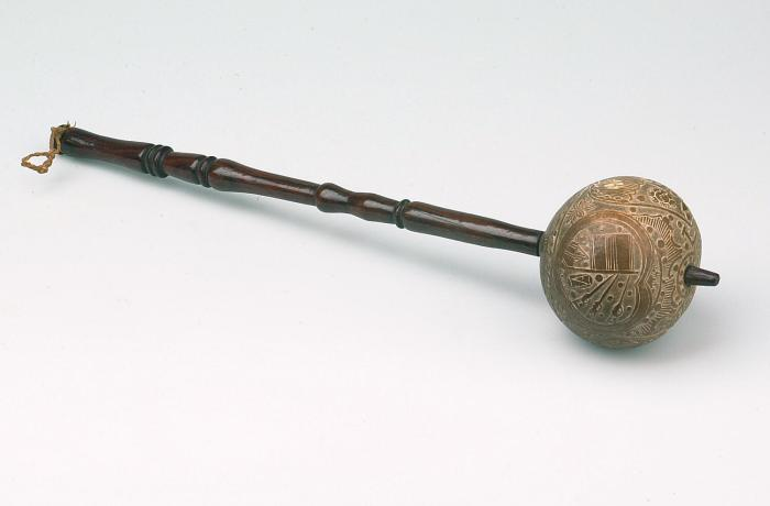 Schudinstrument. Rammelaar van kalebas Unknown language: Saka obia Sake-sake